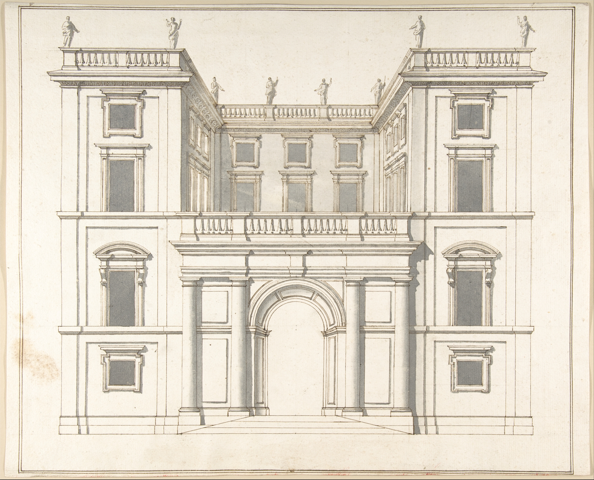 Drawing; Drawings